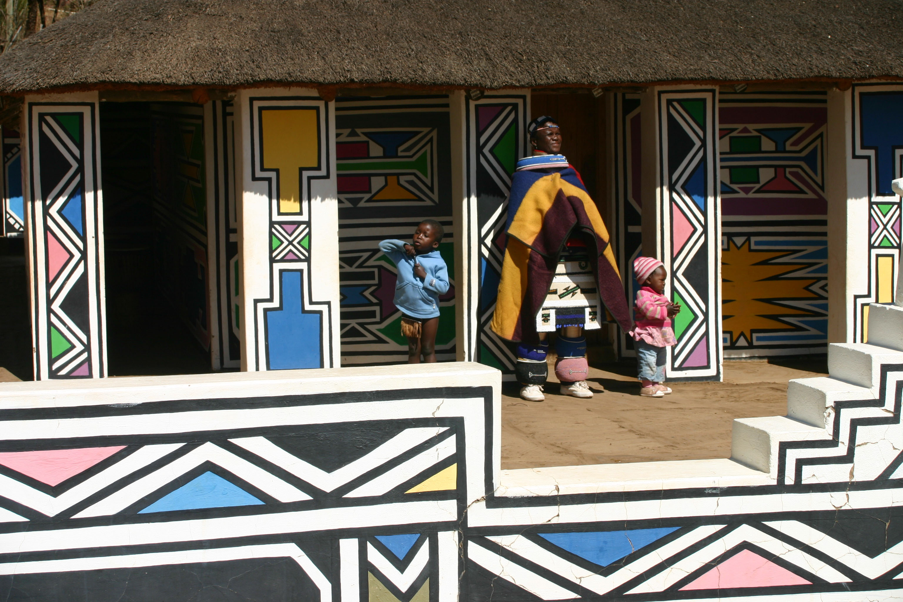 Maison_Ndébélés